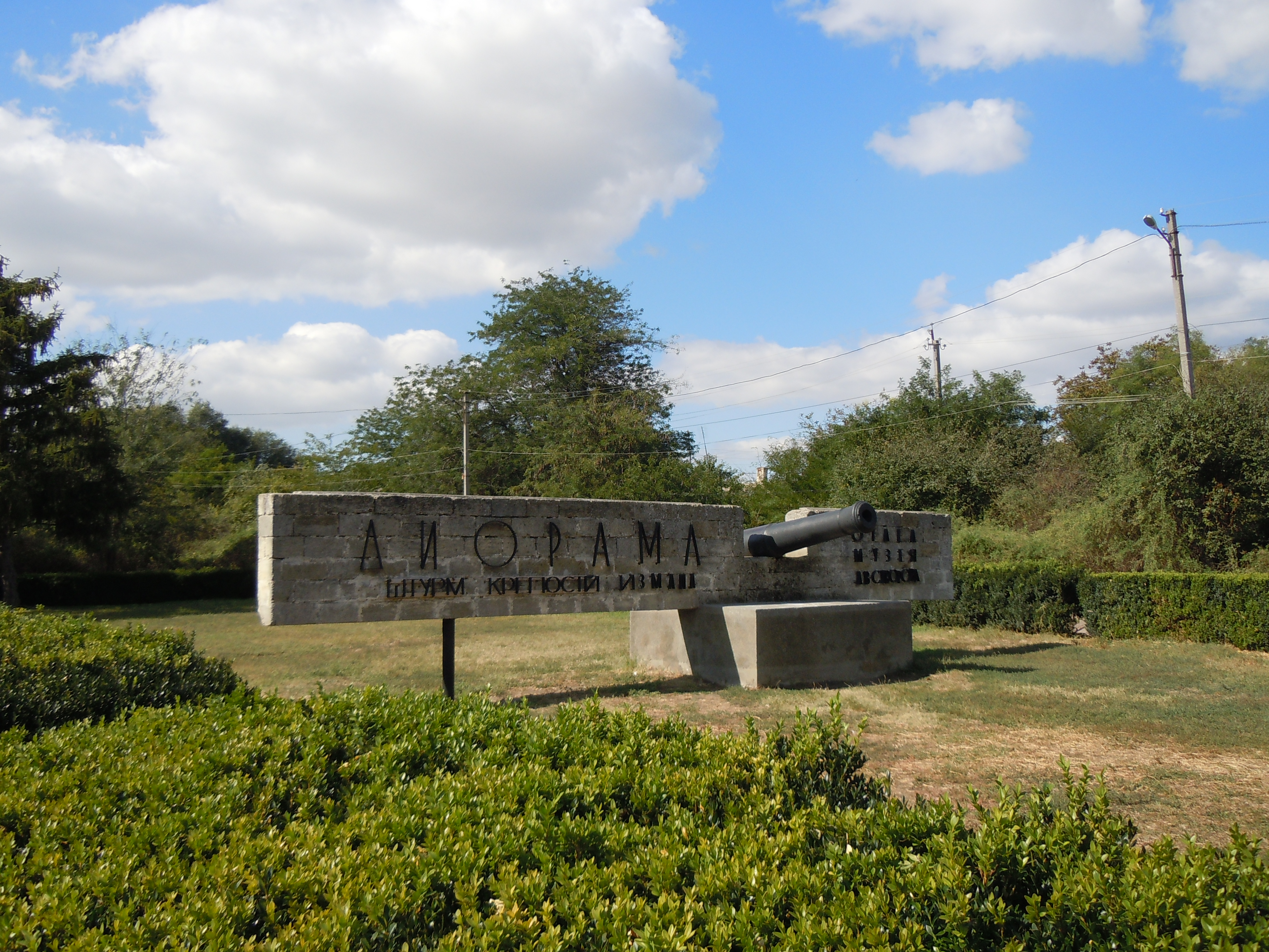 Музей "Діорама Ізмаїла"